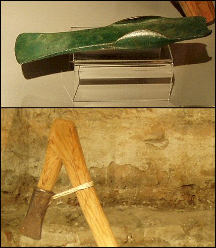 Mittelständiges Lappenbeil und Tüllenbeil aus der Archäologischen Sammlung des Stadtmuseums Wels